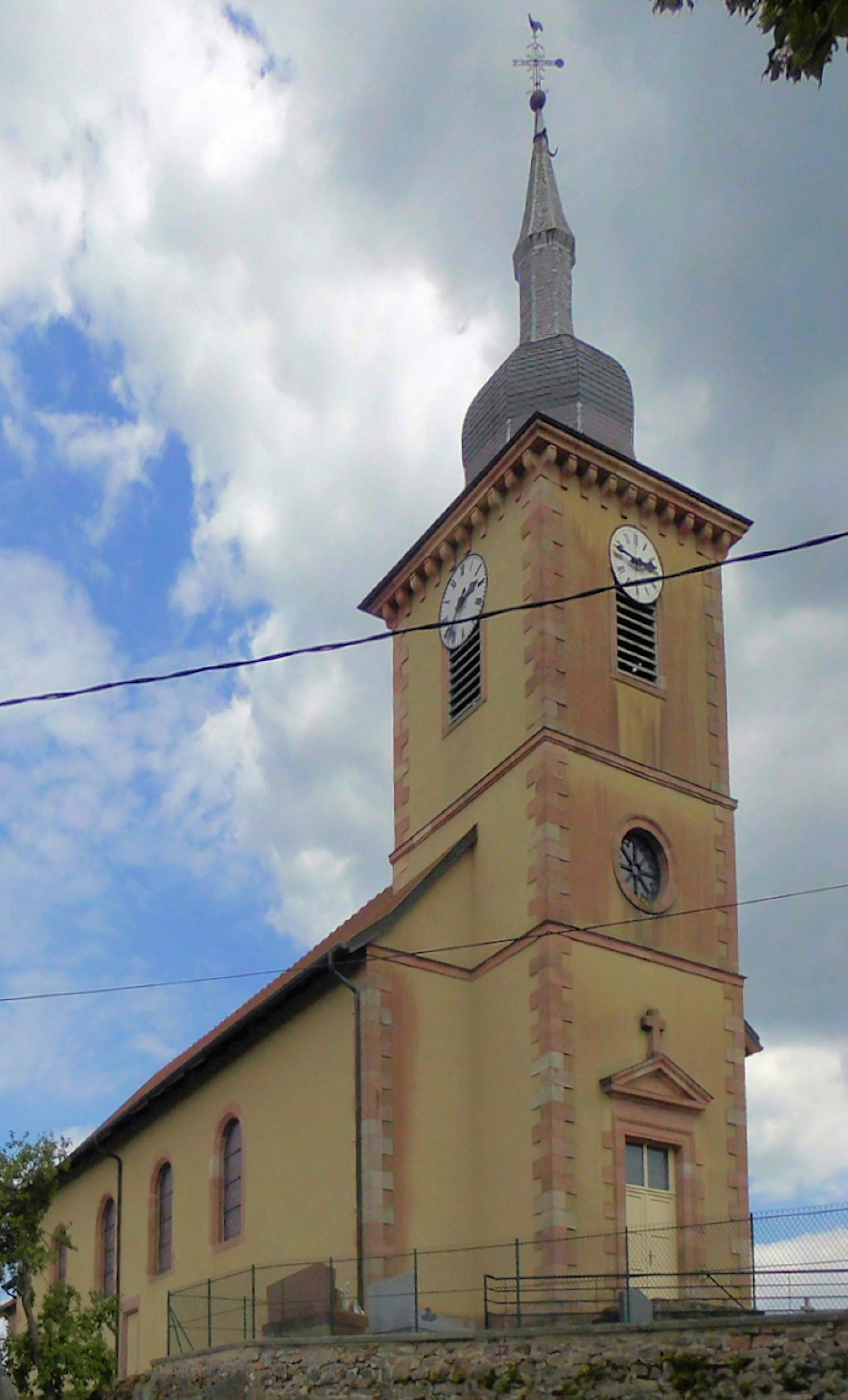 L'église Saint-Vincent d'Entre-deux-Eaux